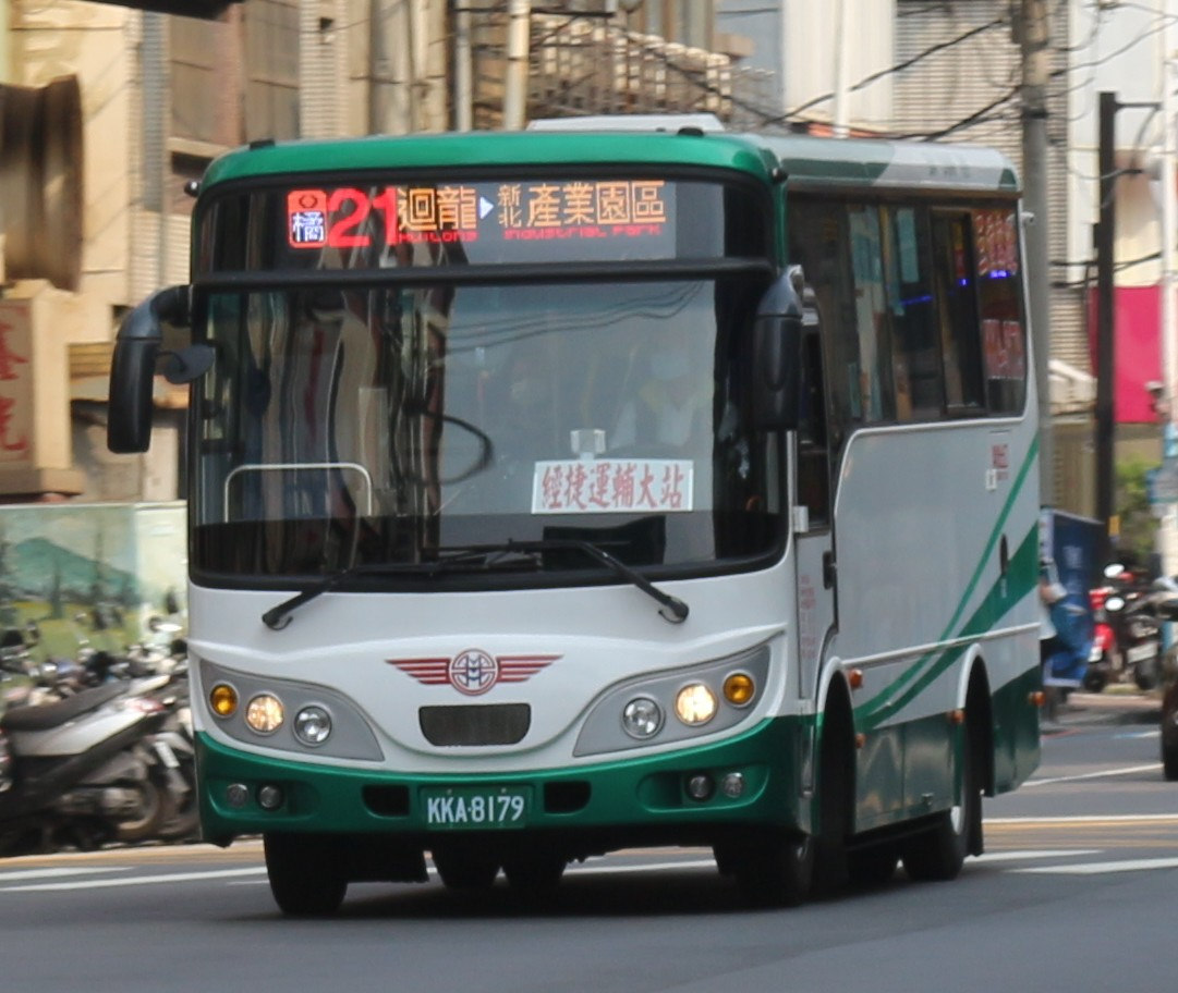 三重客運 2019 HINO FC7JGTZ-AZF KKA-8179 橘21